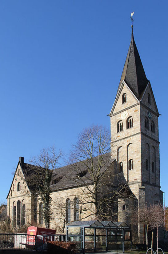 Sankt-Antonius-Eremit-Kirche in Ahden